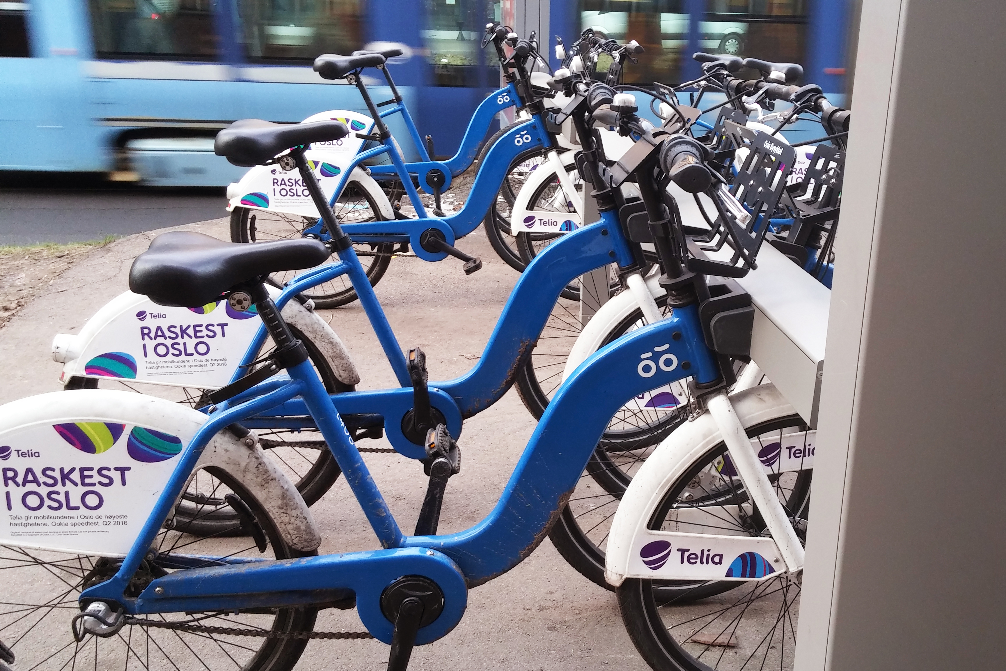 SmartBike à Oslo Norvège en 2016 Photo: Vincent Hilary Retouche: Poil aux Dents